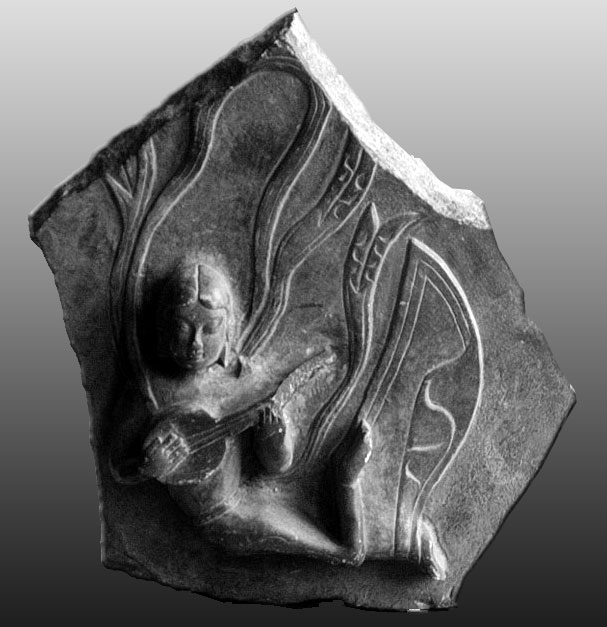 Apsara mit Sitar (bzw. Feitian mit chinesischer Mondlaute); China bei Luoyang; Longmen-Grotten; 4.-6. Jahrhundert; Steinfragment; 32x32x12cm